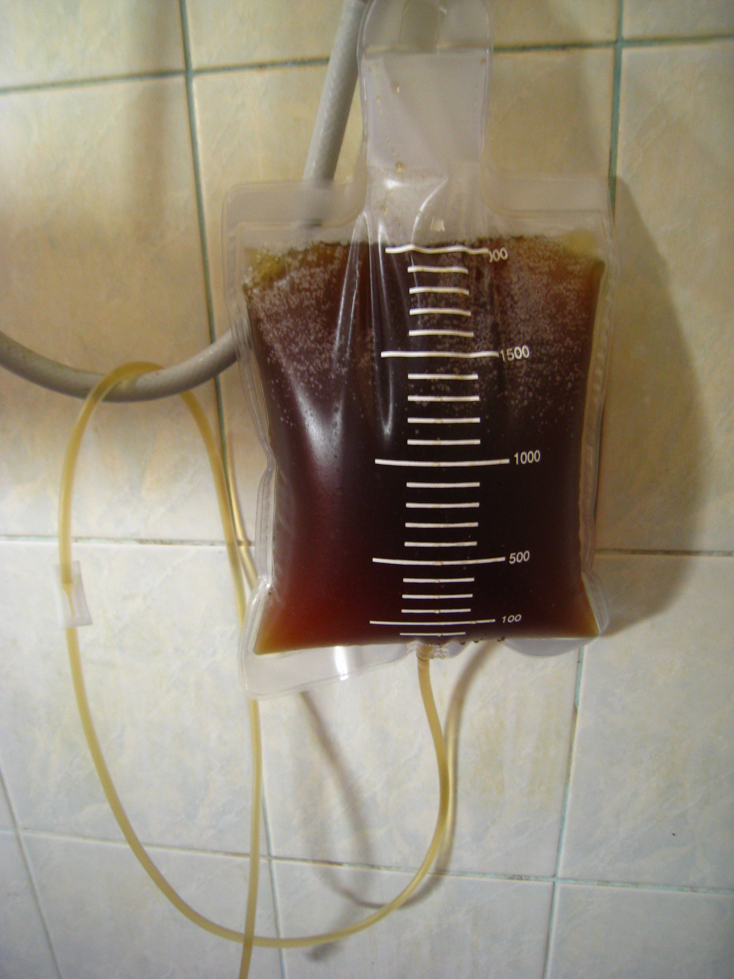 Saco de enema, instrumento de retenção do conteúdo ulteriormente ingressado sobre o reto